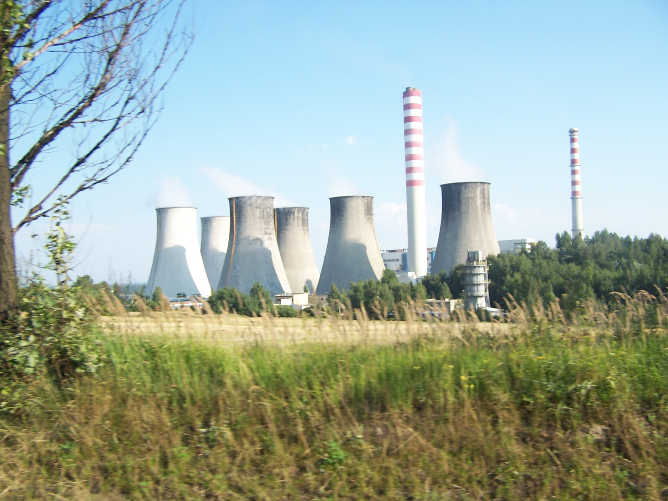 chłodnie w elektrowni Łaziska